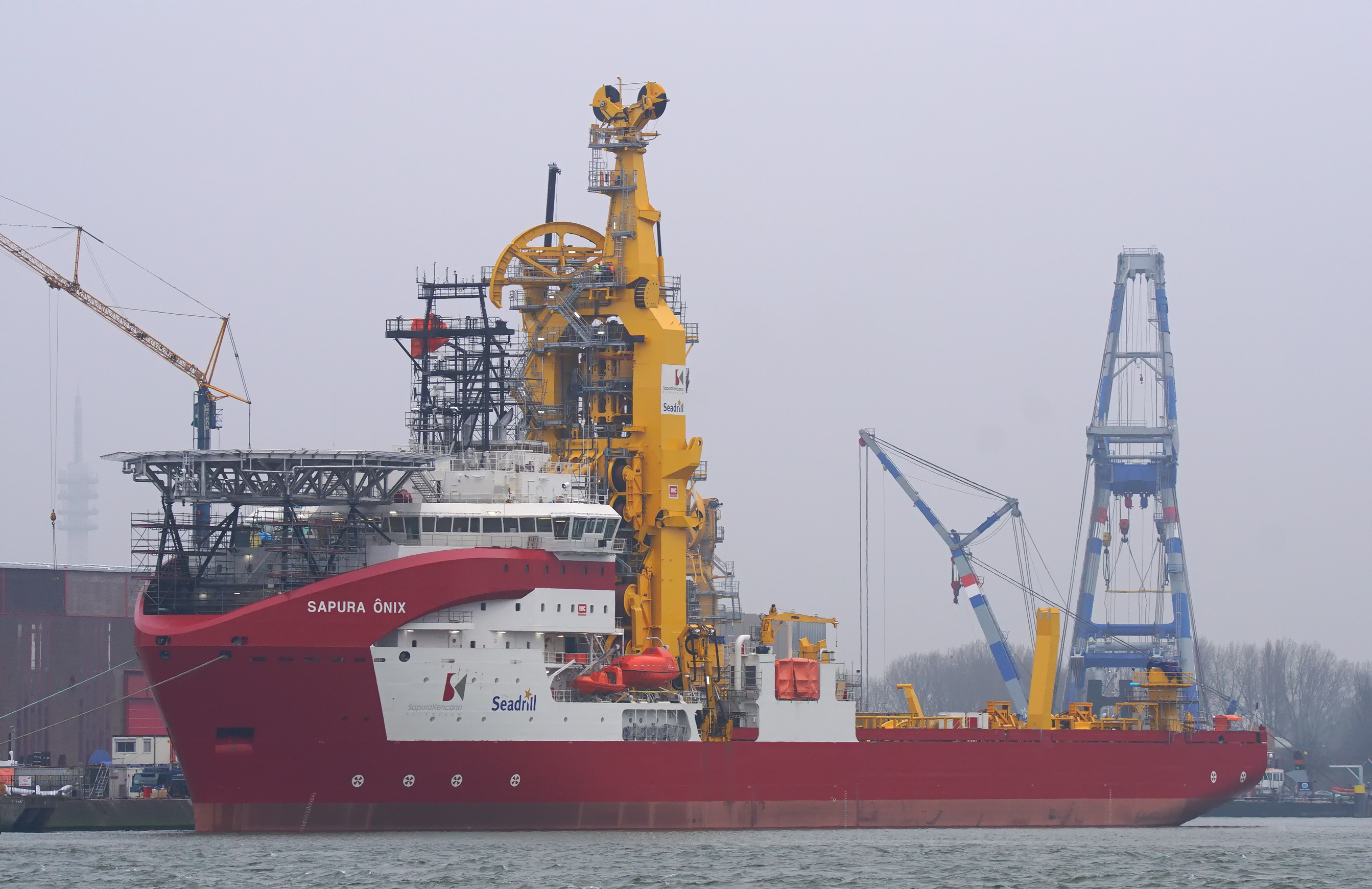 Heysehaven Rotterdam 3-12-2014